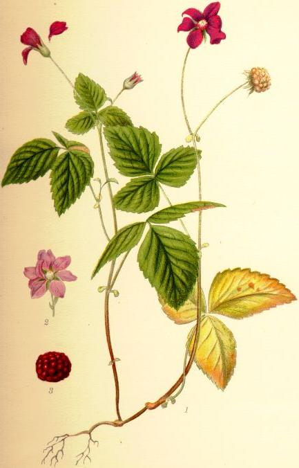 Åkerbär (Rubus arcticus) växten i naturlig storlek, blomma av blekröd varietet, åkerbäret (1/1).